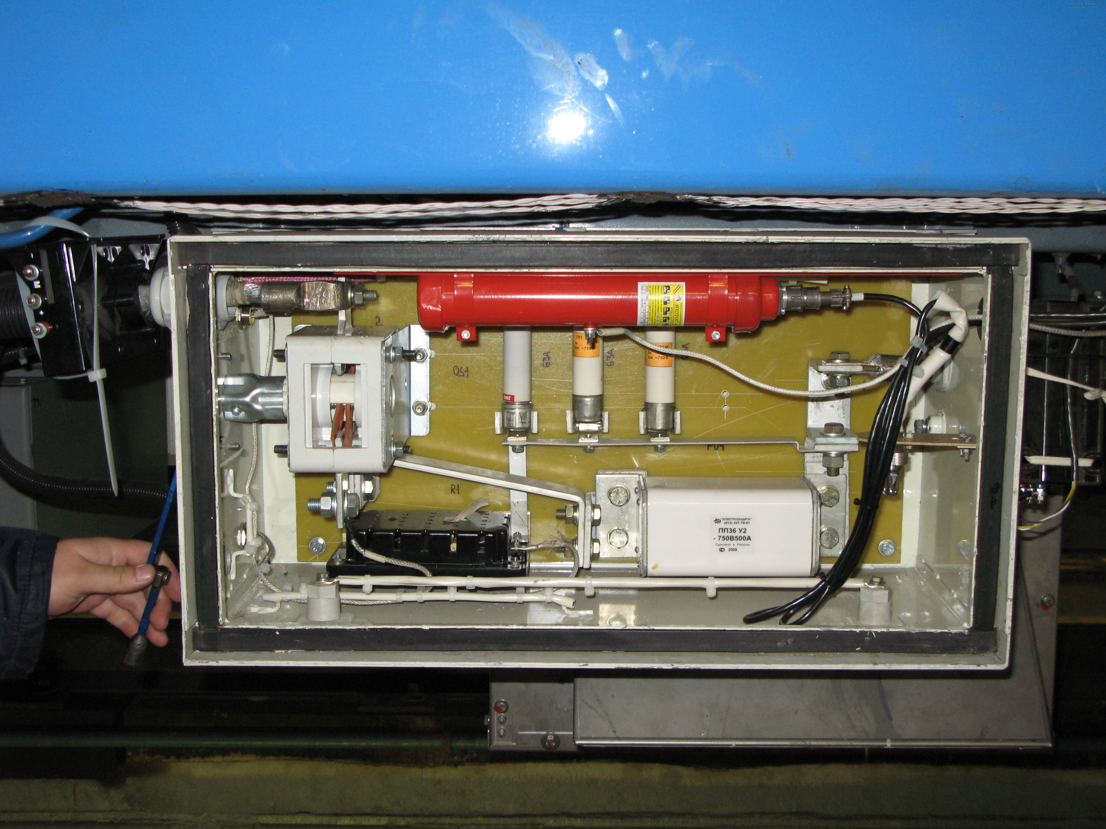 Ящик с высоковольтными предохранителями в подвагонном пространстве электропоезда метро 81-760-761